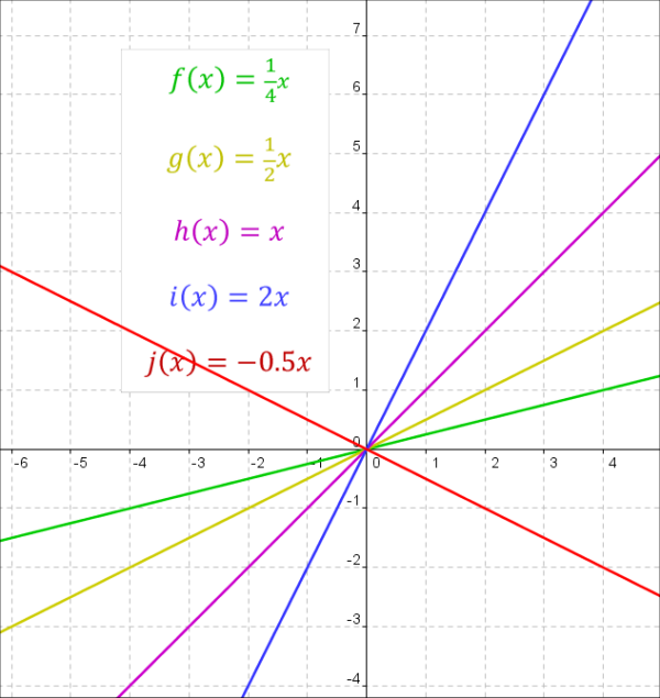 Suoraan verrannollisten funktioiden kuvaajia